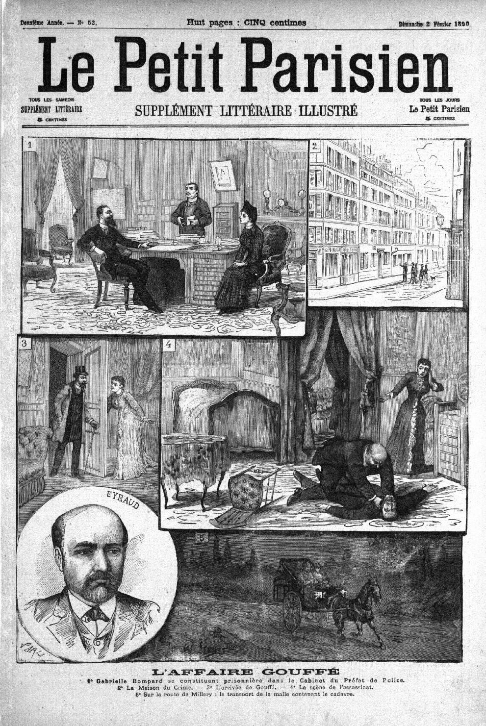 L'Affaire Gouffé. Supplément littéraire illustré du Petit Parisien, 2 février 1890, p. 1.